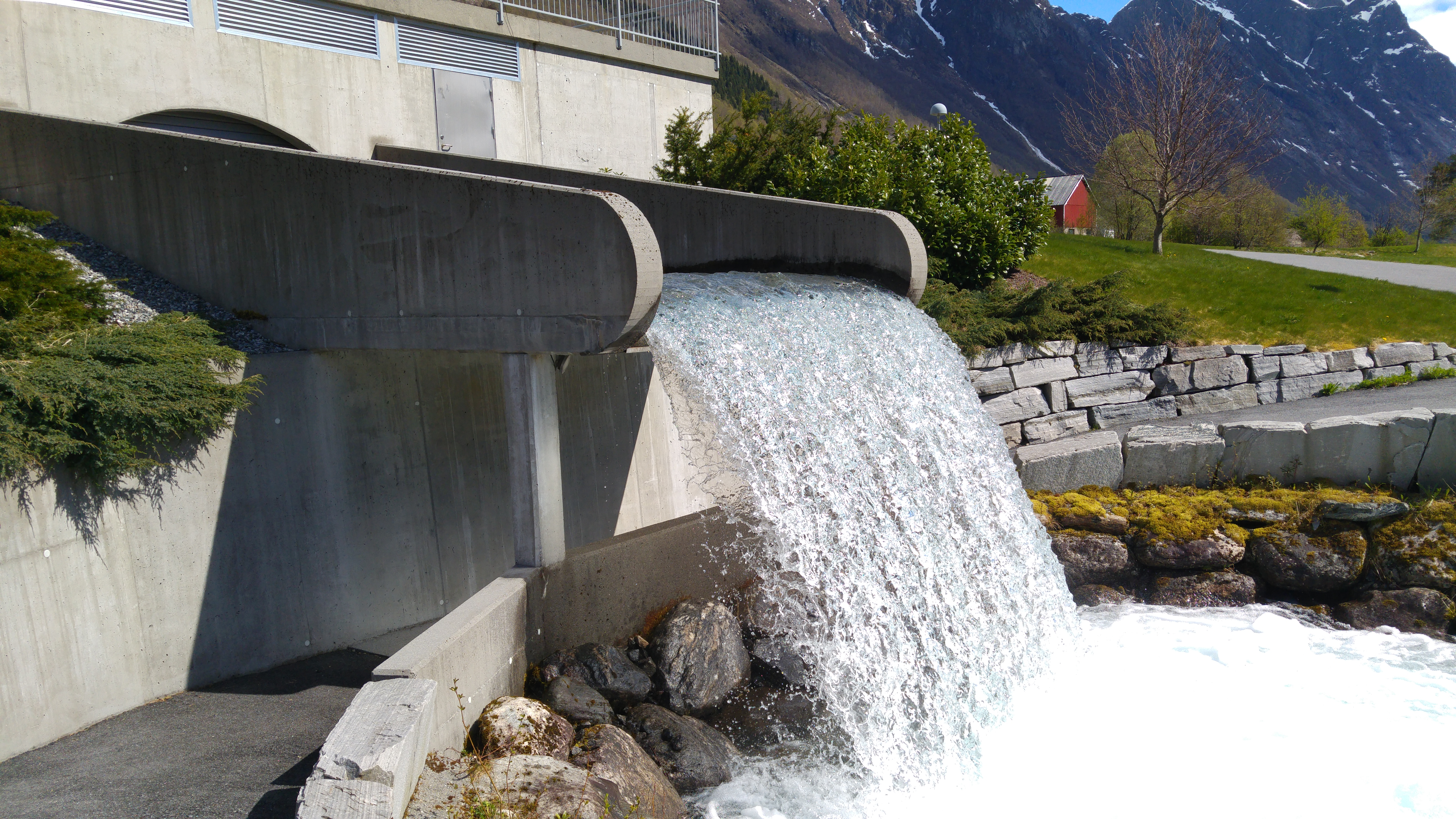 Urke kraftverk utløp